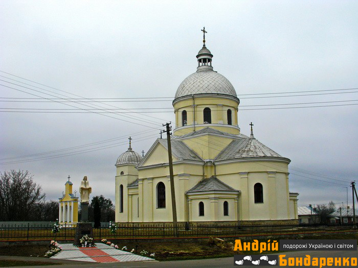 Церква Апп.Петра і Павла у с. Йосипівка, Буського району, Львівської області